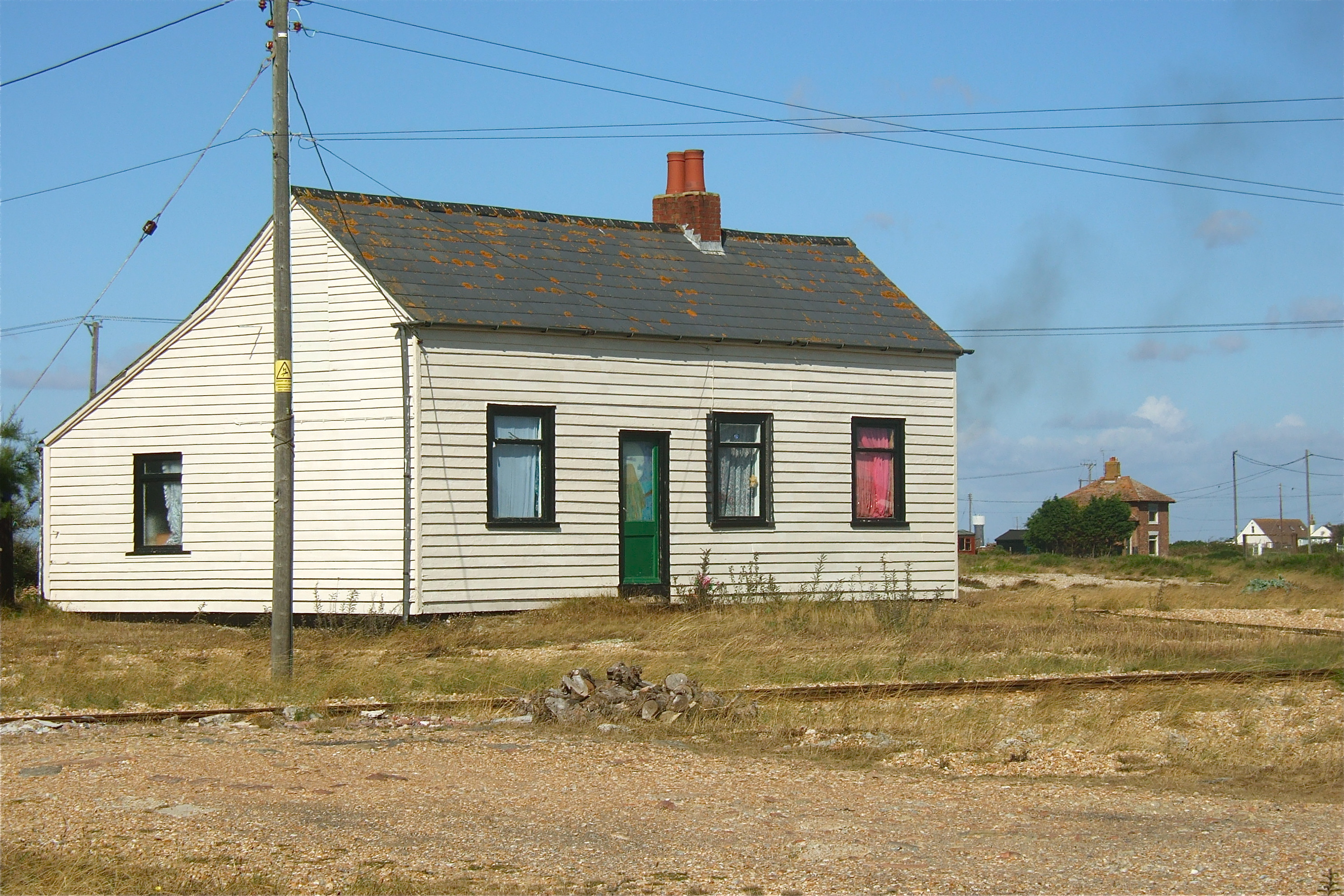 Einer der Häuser in Dungeness, die Kulisse für das Cover von A Collection of Great Dance Songs der Platte waren.